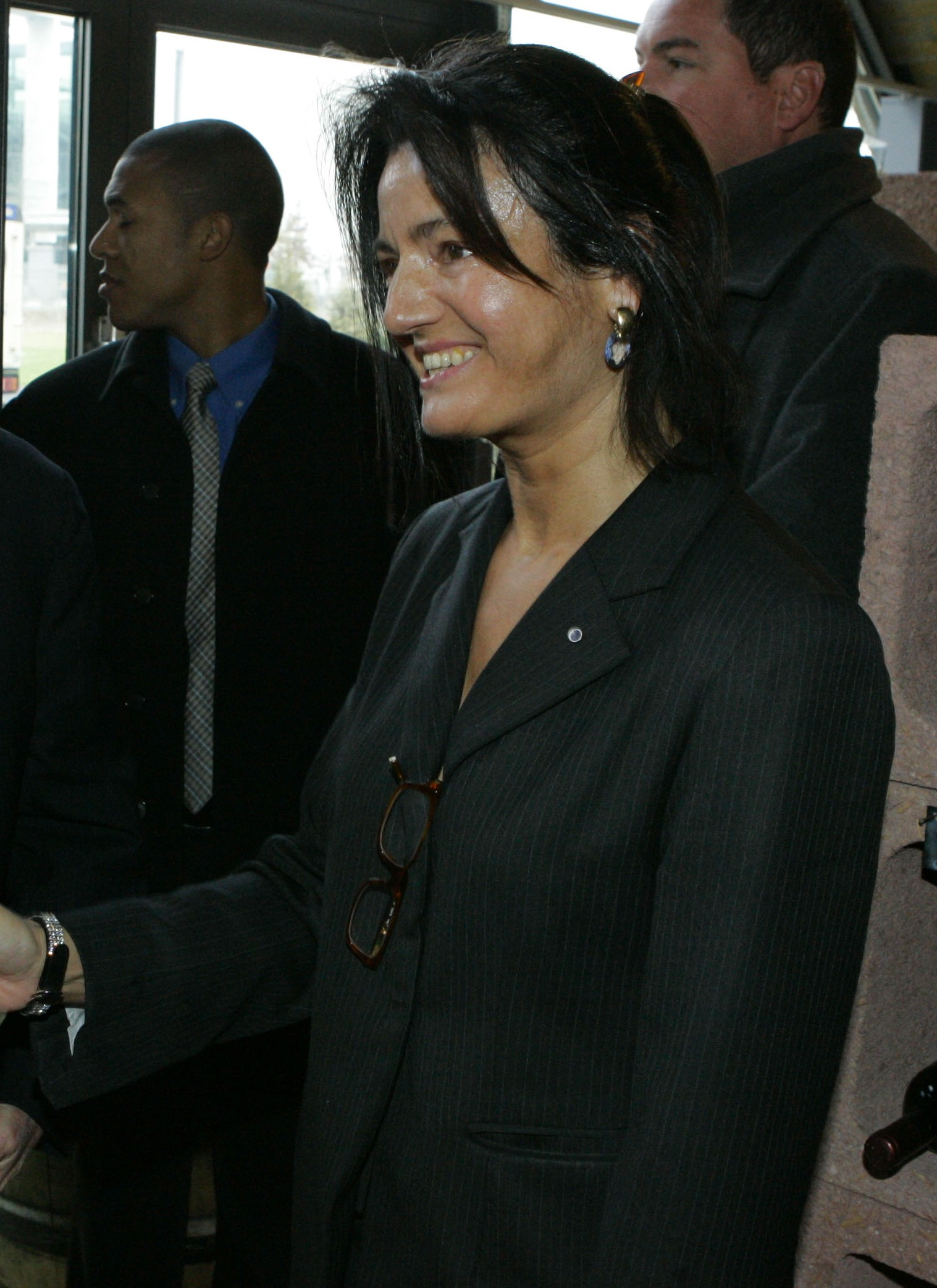 Margarita Mathiopoulos anlässlich des Transatlantischen Forums der FDP in Berlin am 13.01.2006